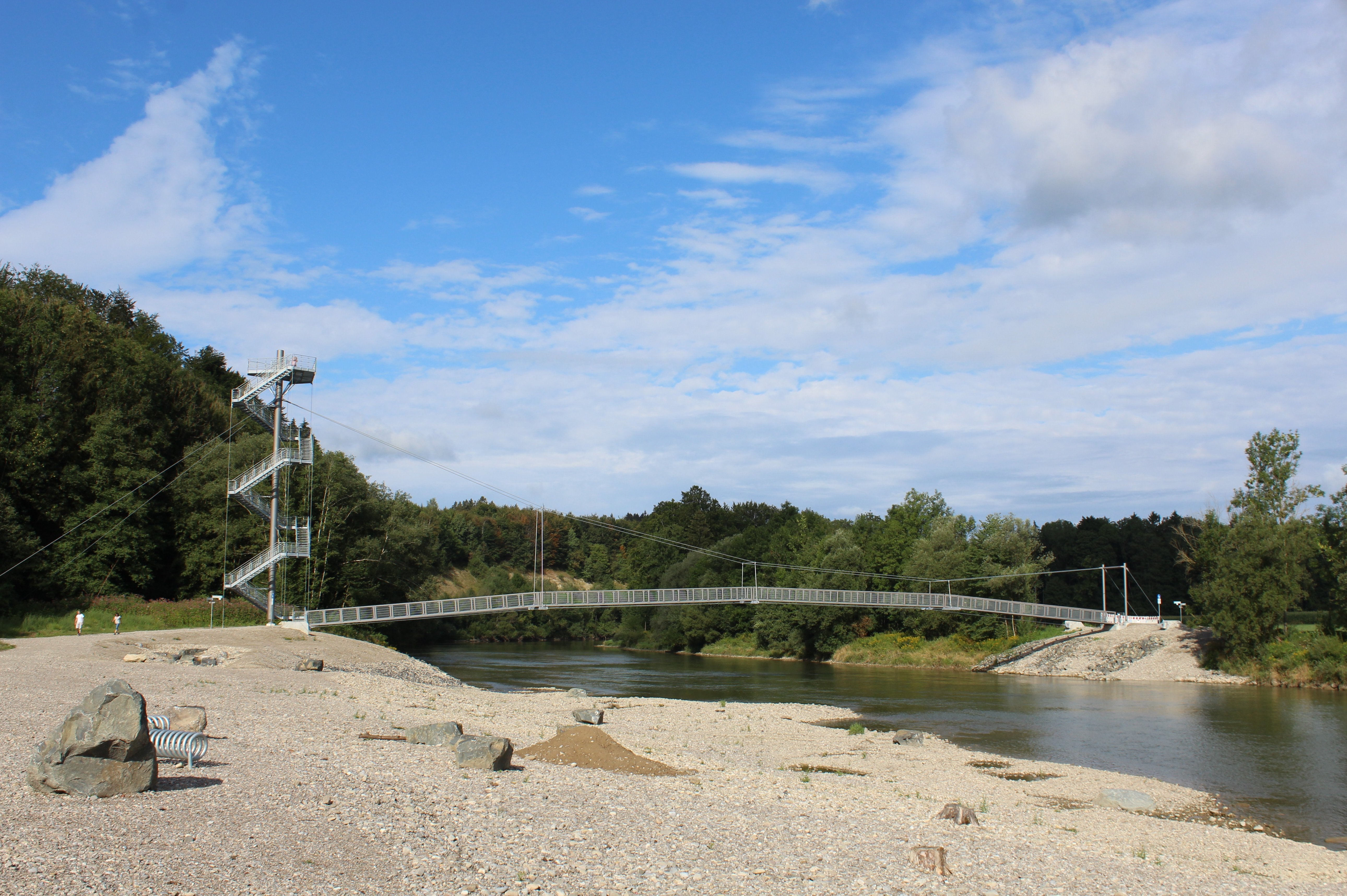 87764 Legau, Germany